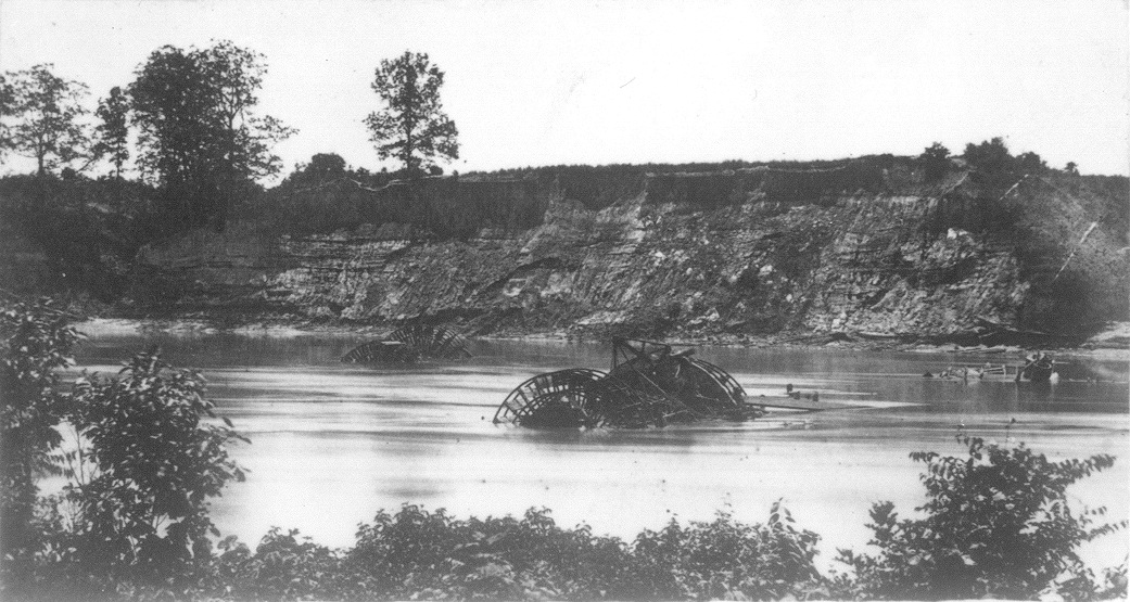 Drewry's Bluff 1865, fotografiert von Levy&Cohen. Aus der Sammlung der US-Library of Congress, negative #LC-B8184-10381.